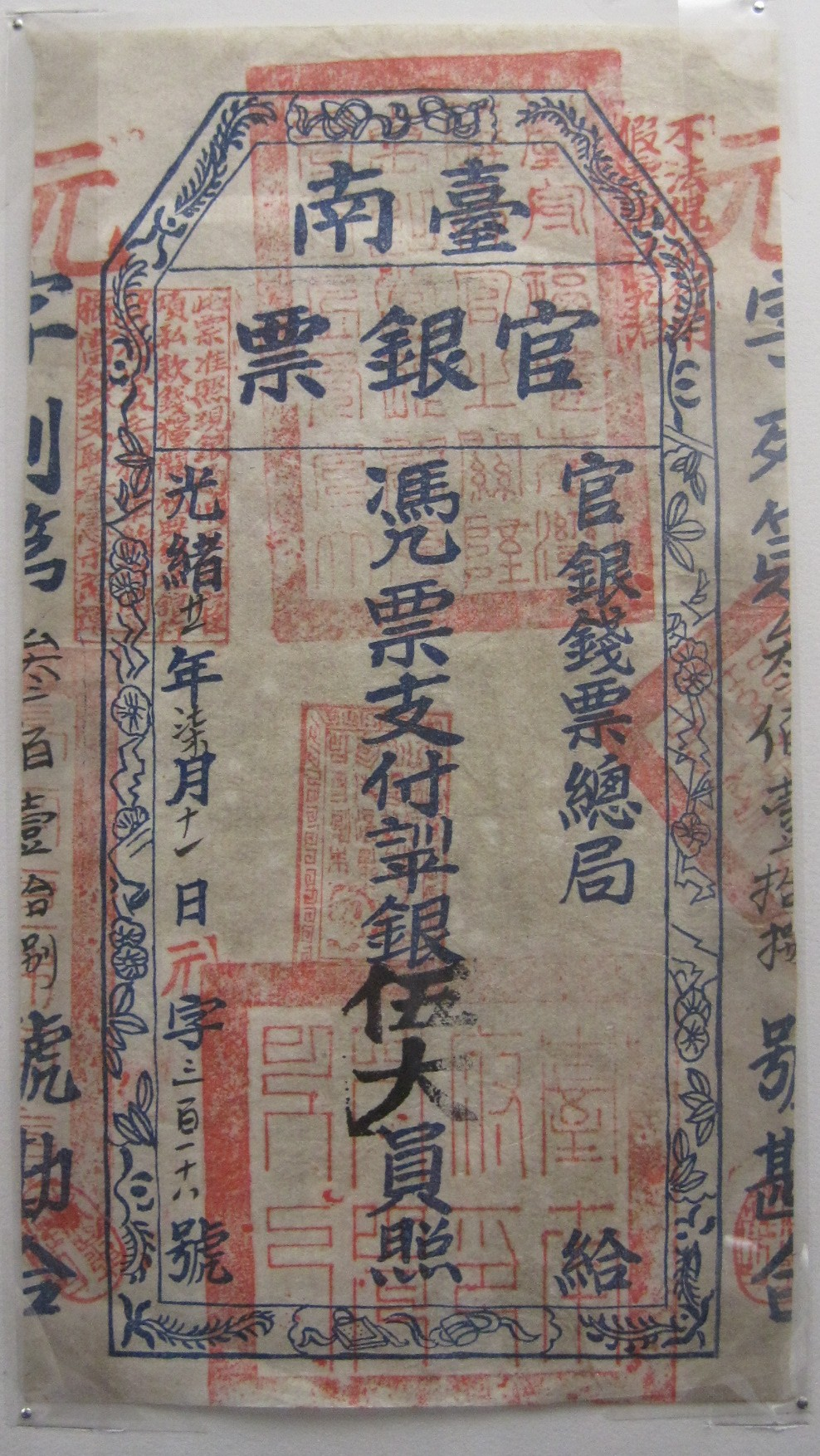 臺南官銀票伍大員。攝於國立臺灣歷史博物館。